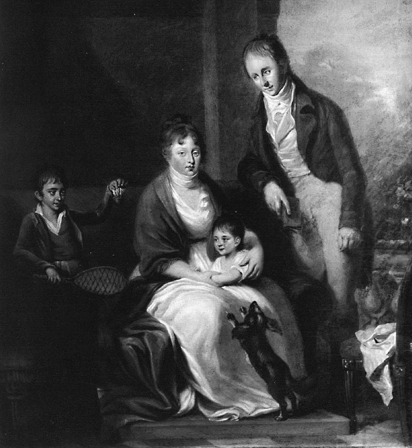 Семейство Сергея Васильевича Толстого (1767/71-1823/31)